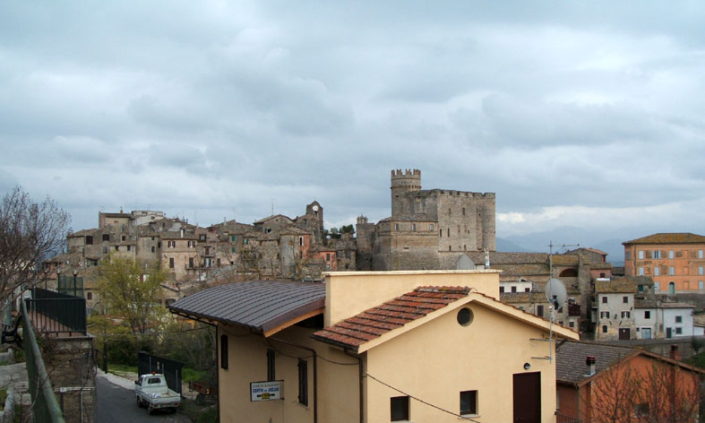 Nazzano RM